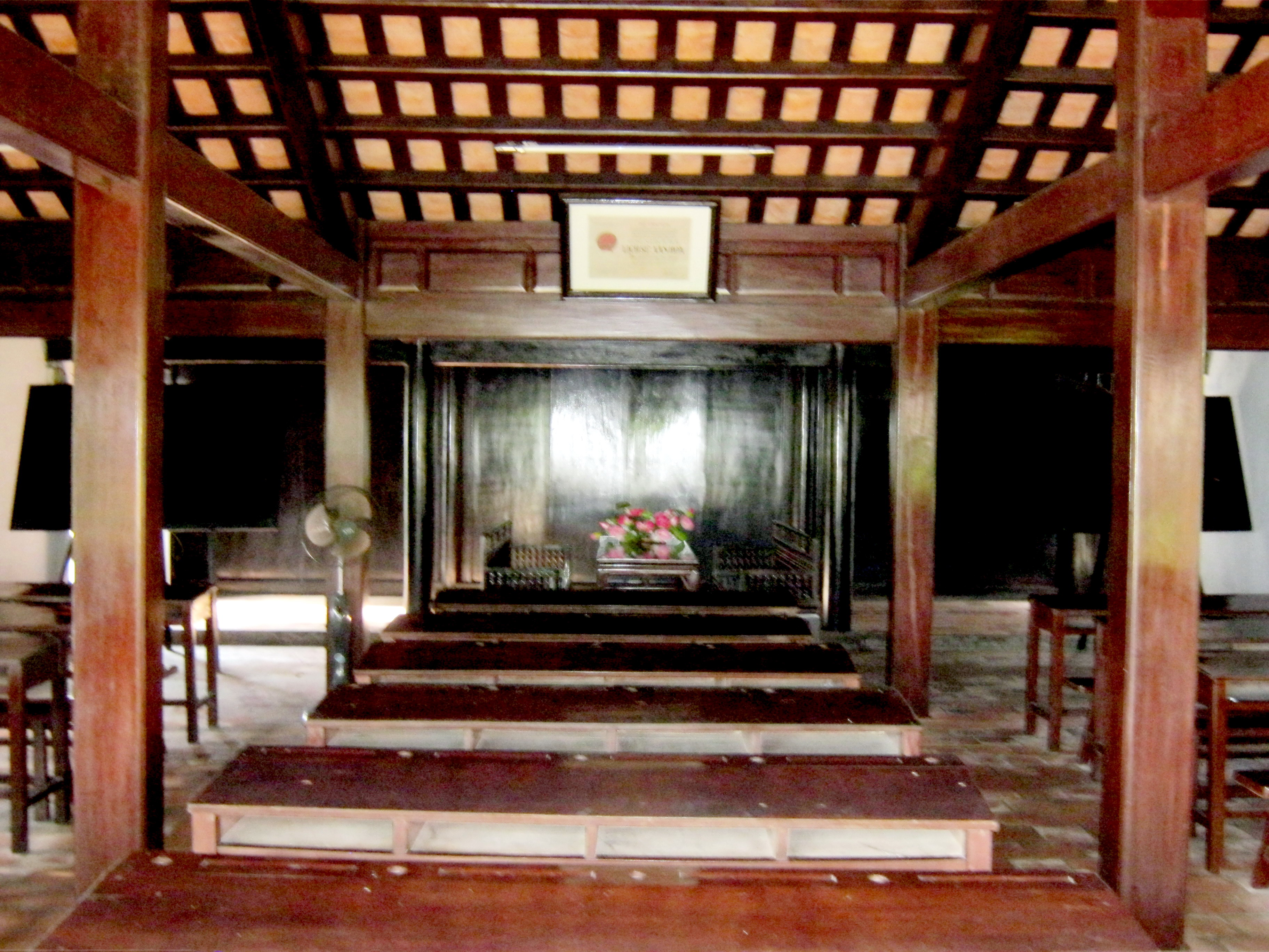 Lớp học trong trường Dục Thanh ở Phan Thiết, tỉnh Bình Thuận, Việt Nam.